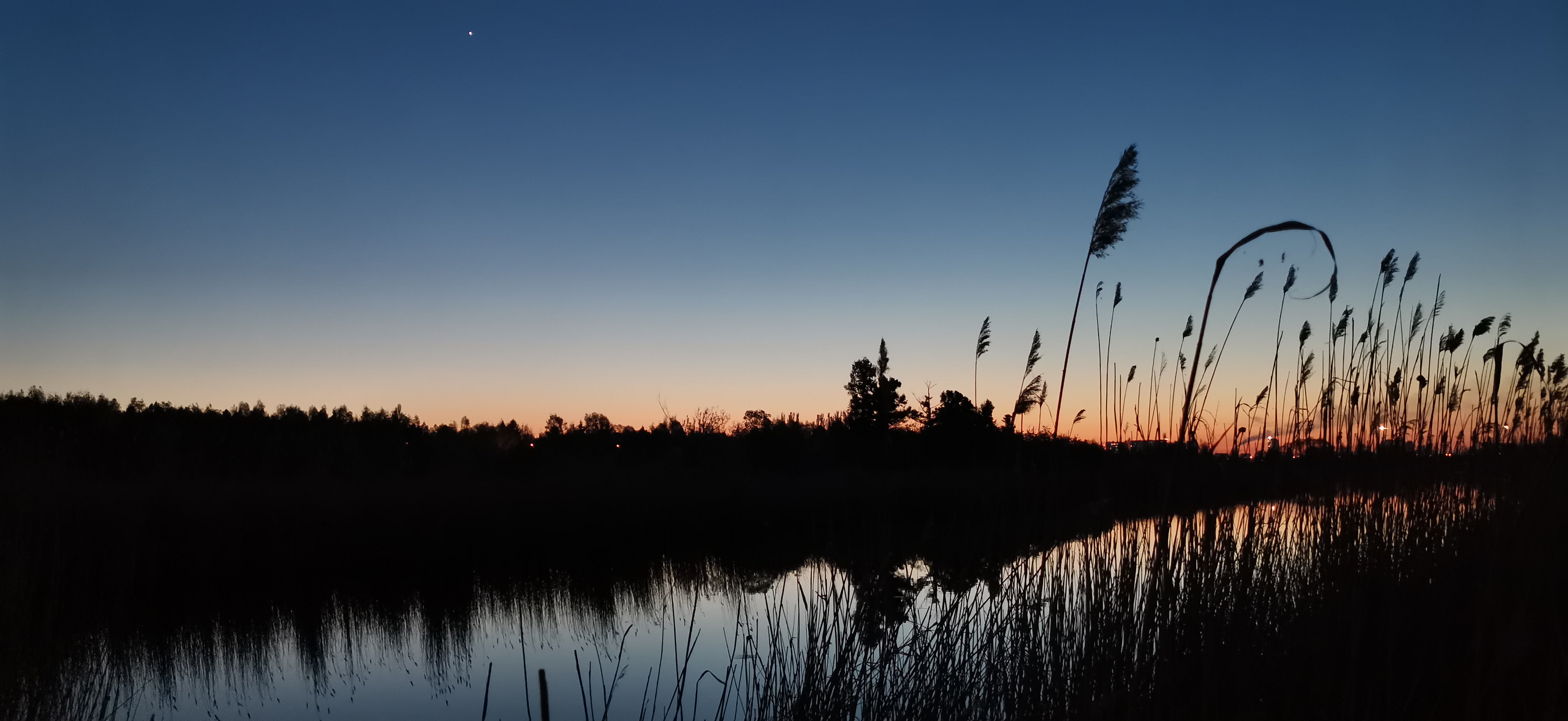 Виды на природу в Парке имени 30-летия Победы